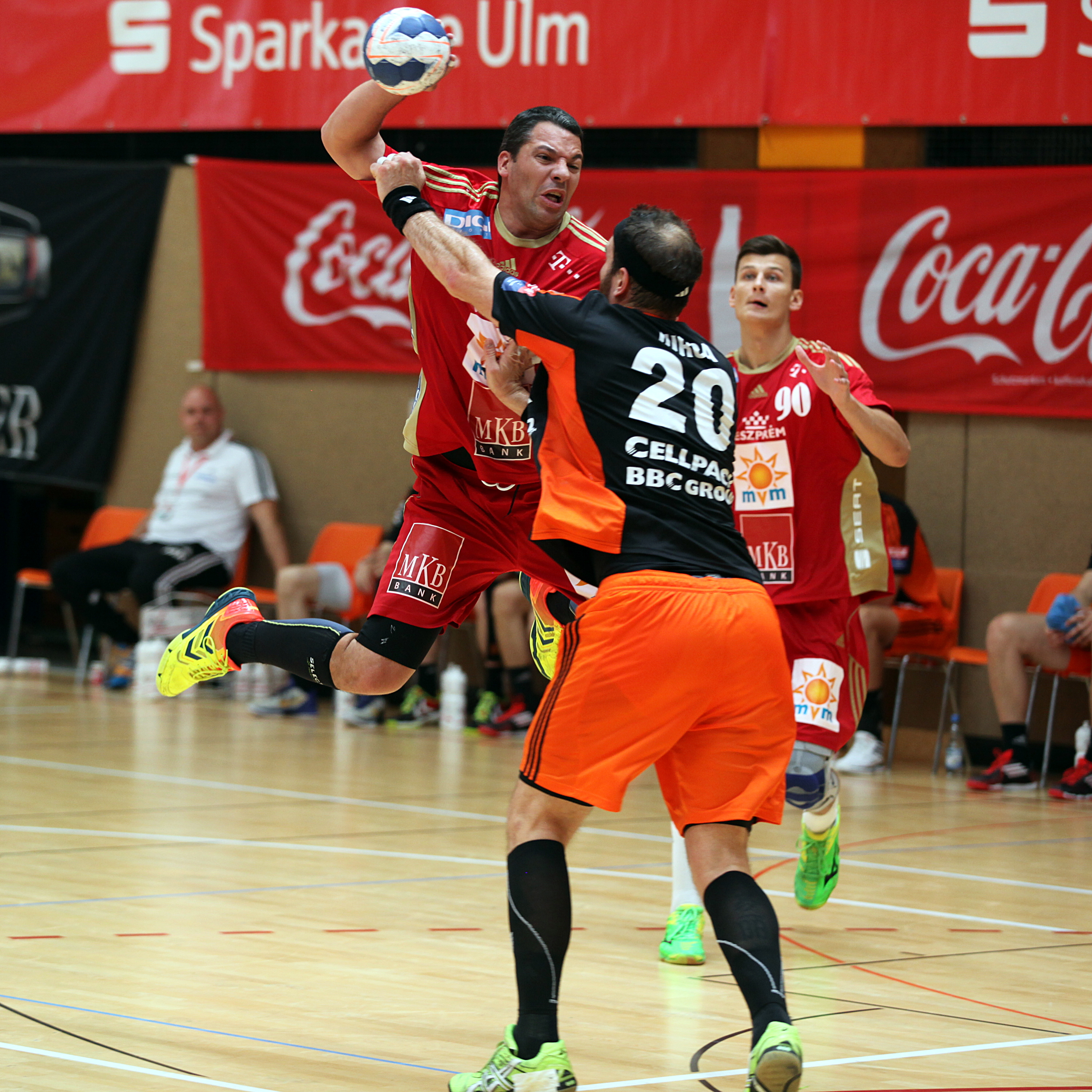 Chema Rodríguez, Handballspieler von KC Veszprém am 16. August 2014 beim Sparkassen-Cup in Ehingen.